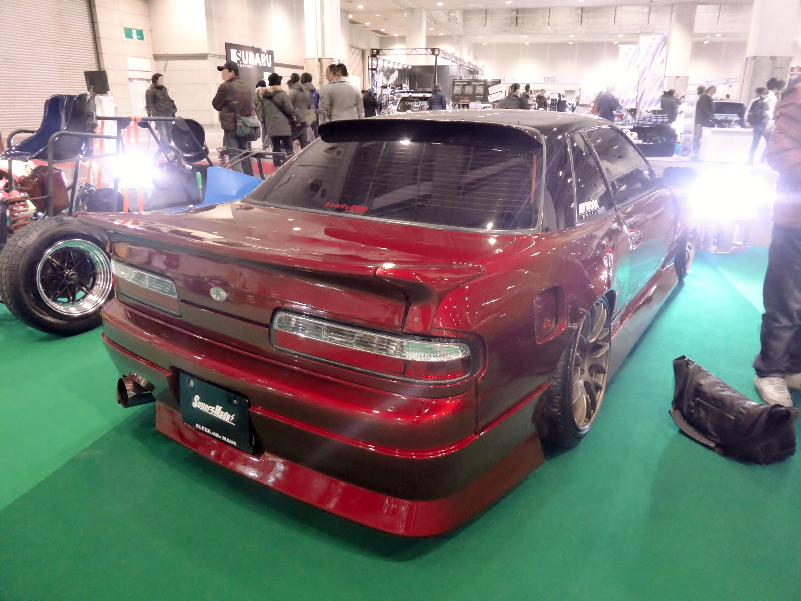 大阪オートメッセ2018に於いてマイティボーイワンビア岡本SPLを撮影。